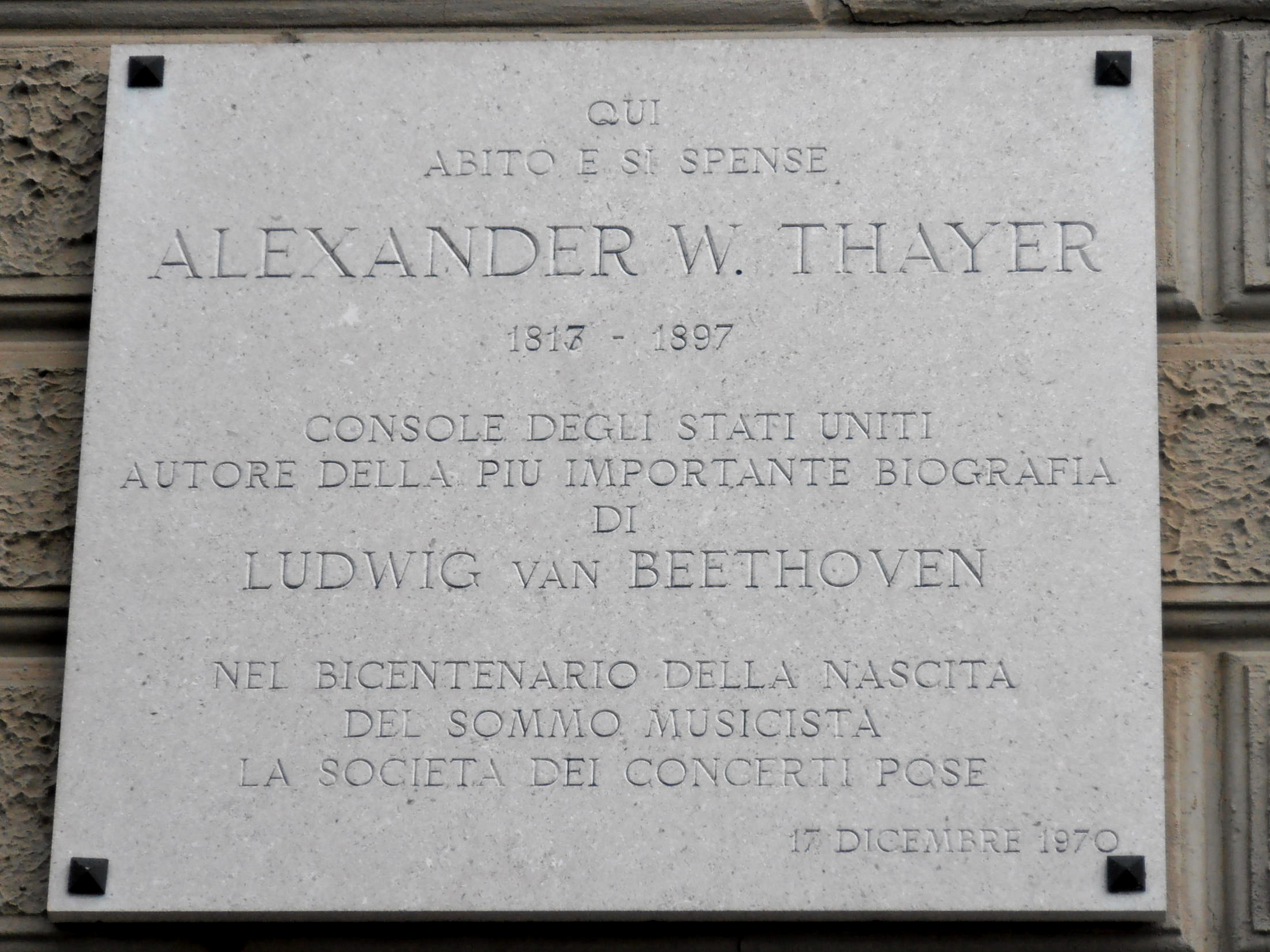 Italy - Trieste - Targa ad Alexander Wheelock Thayer